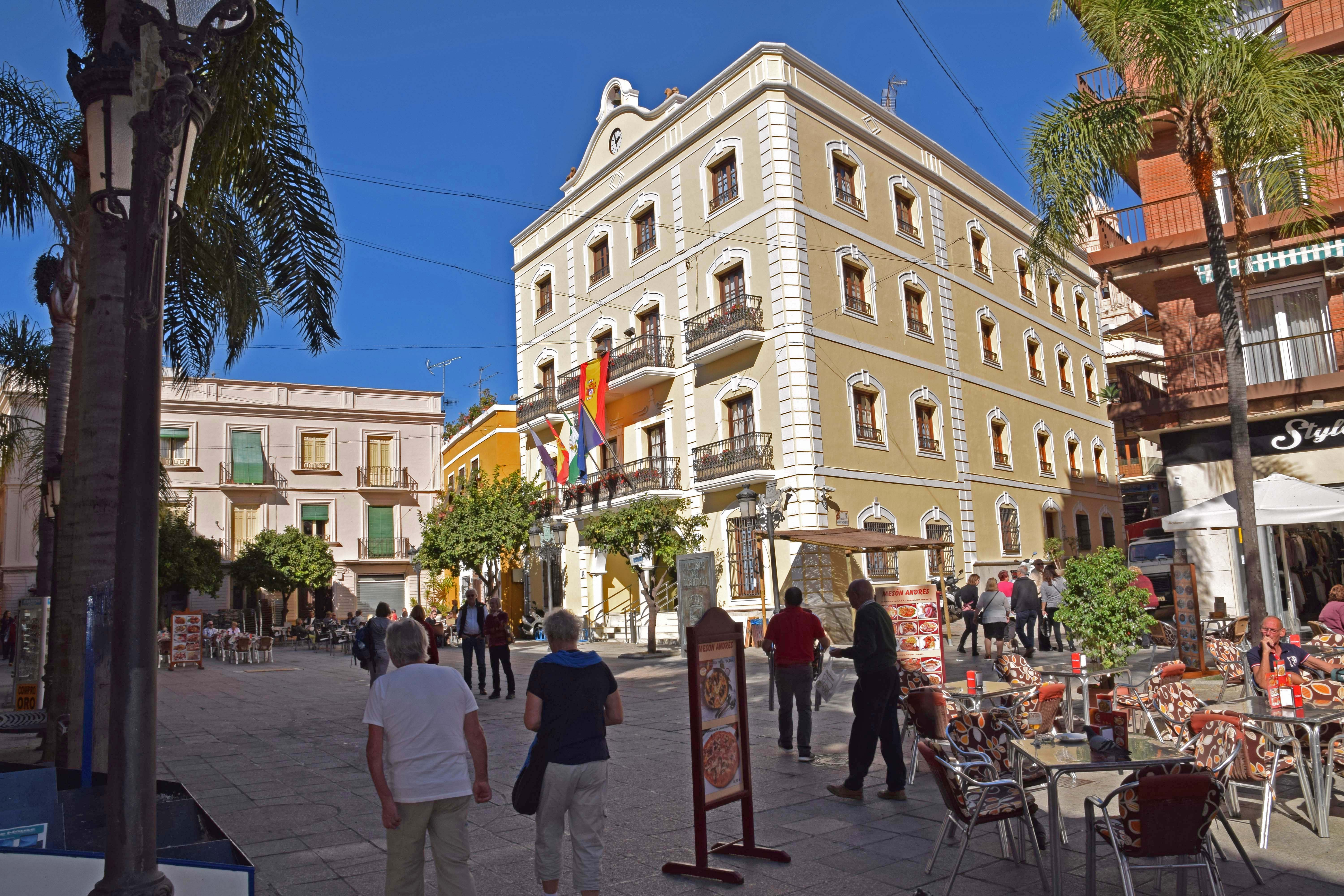 Almunecar town hall, at Plaza de la Constitution